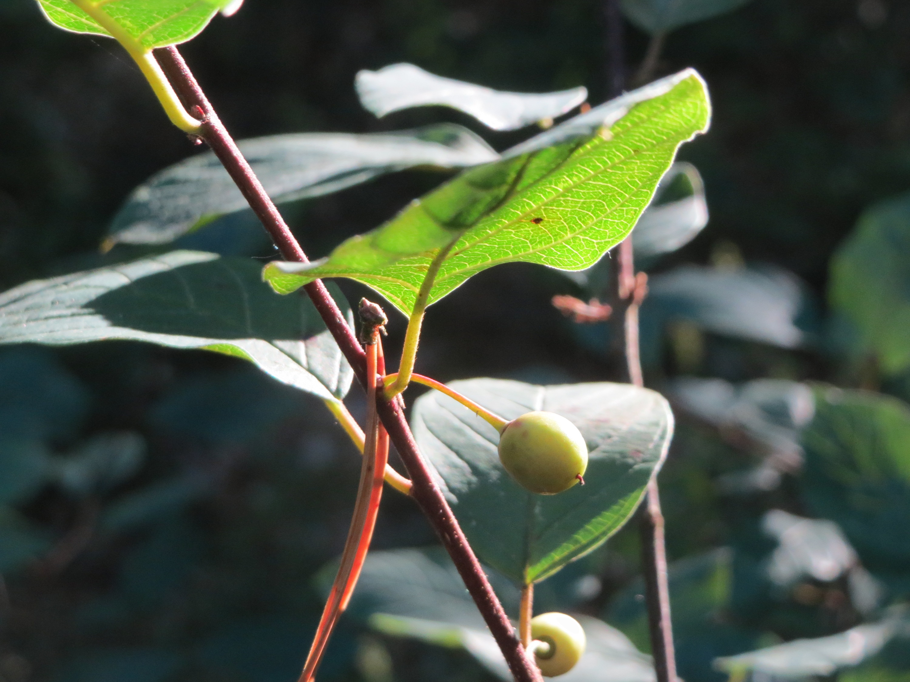 Faulbaum (Frangula alnus) im Schwetzinger Hardt